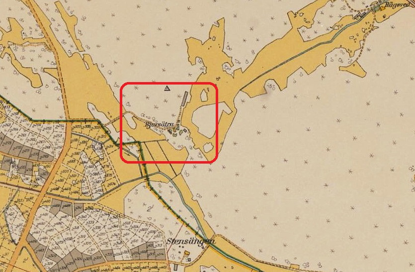 Del av 1934 års karta över Stockholm med omgivningar. Upprättad mellan 1917 och 1934. Torpet Bjursätra.